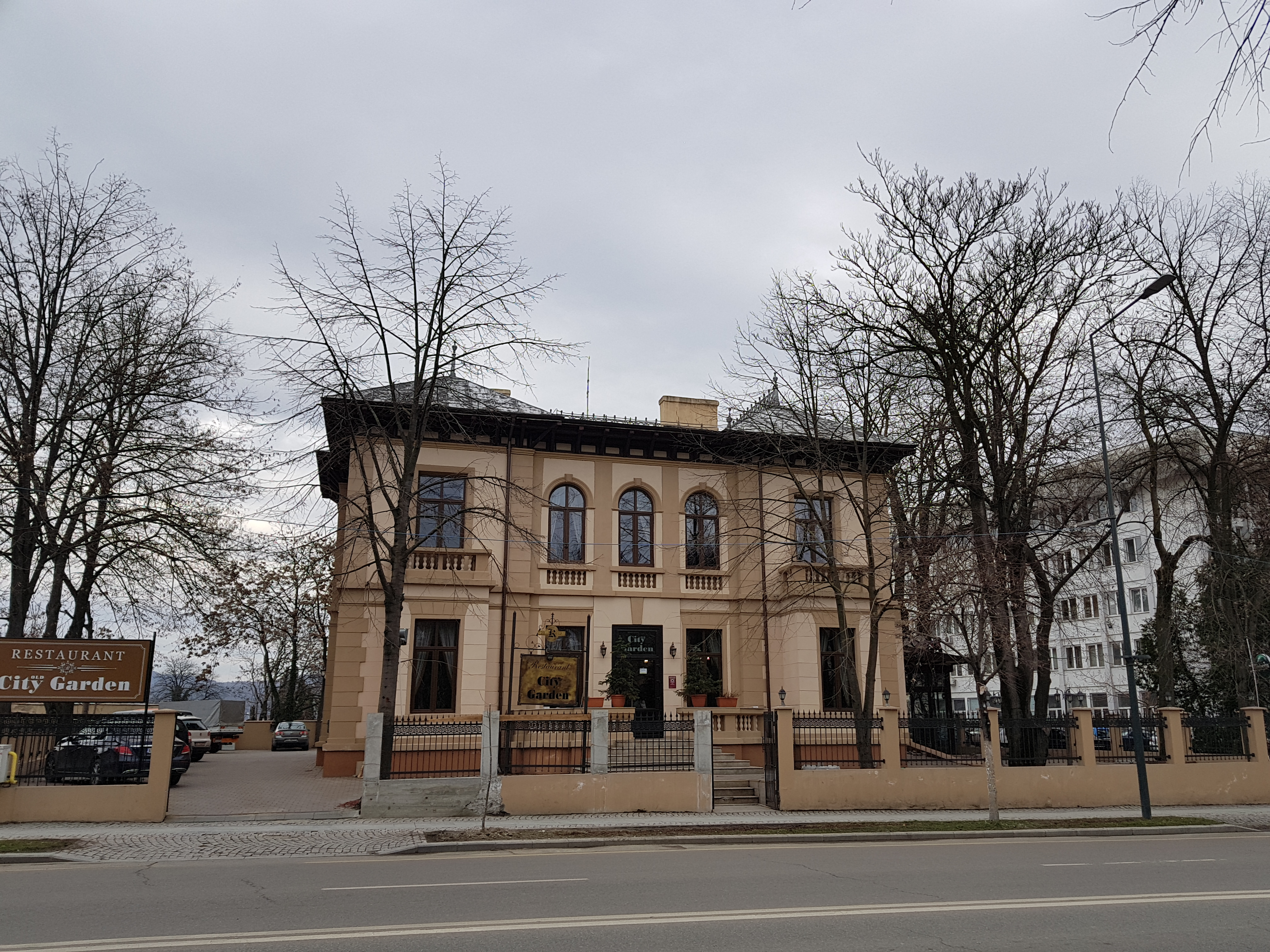 Casa Slăvitescu (1909) -municipiul Râmnicu Vâlcea, Str. Calea lui Traian 120